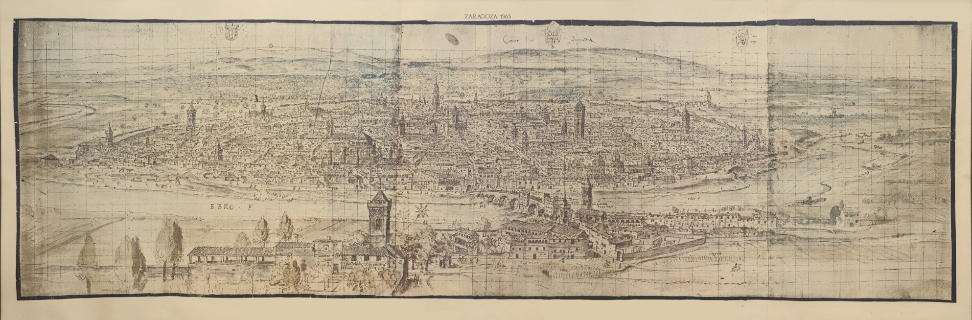 Dibujo de Zaragoza en 1563.